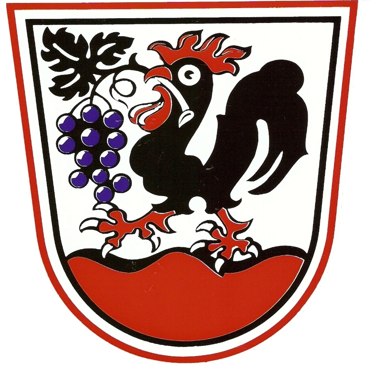 Wappen des Gemeindeteils Scheffau des Marktes Scheidegg